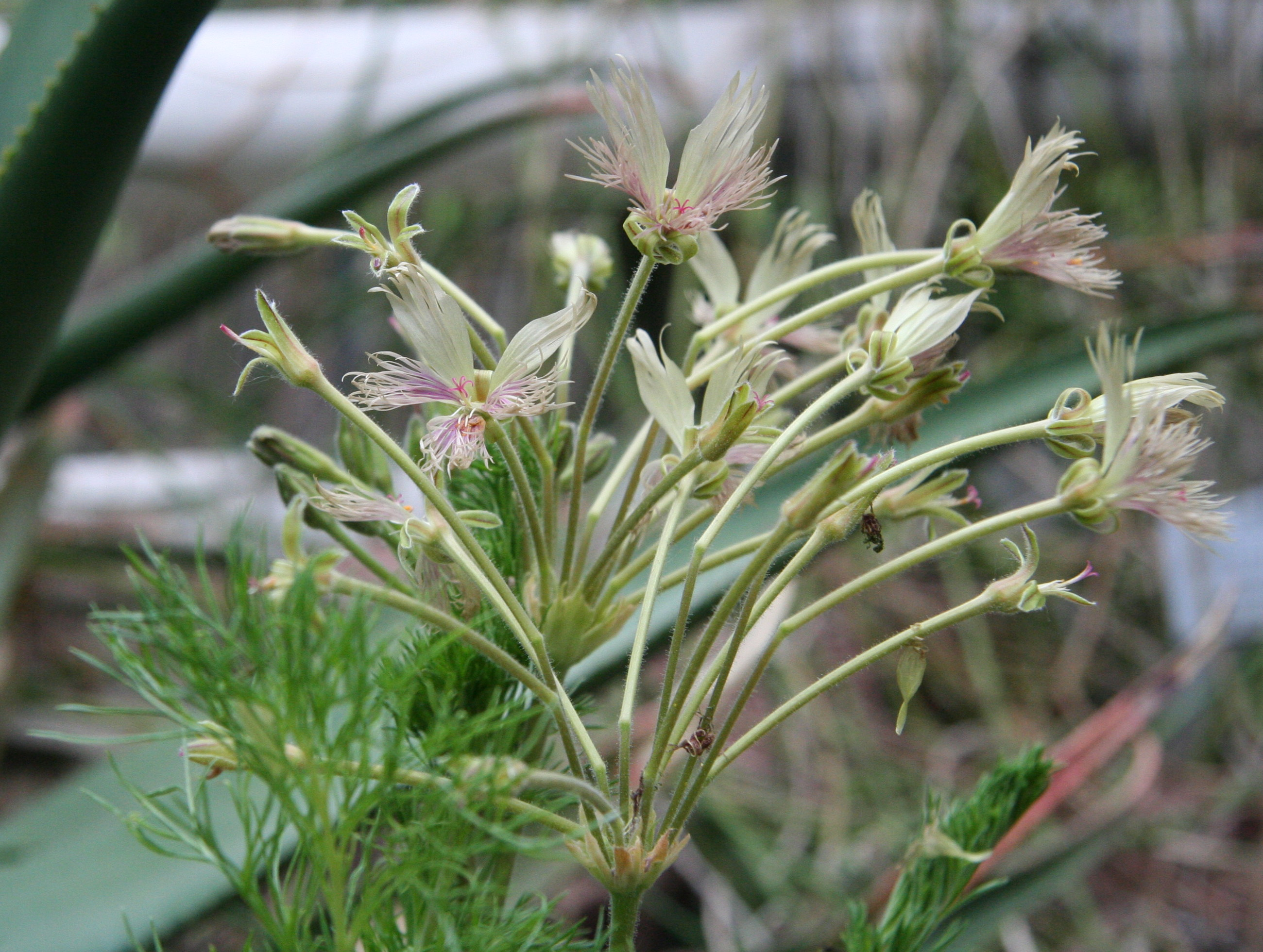 Pelargonium bowkeri im Botanischen Garten Köln